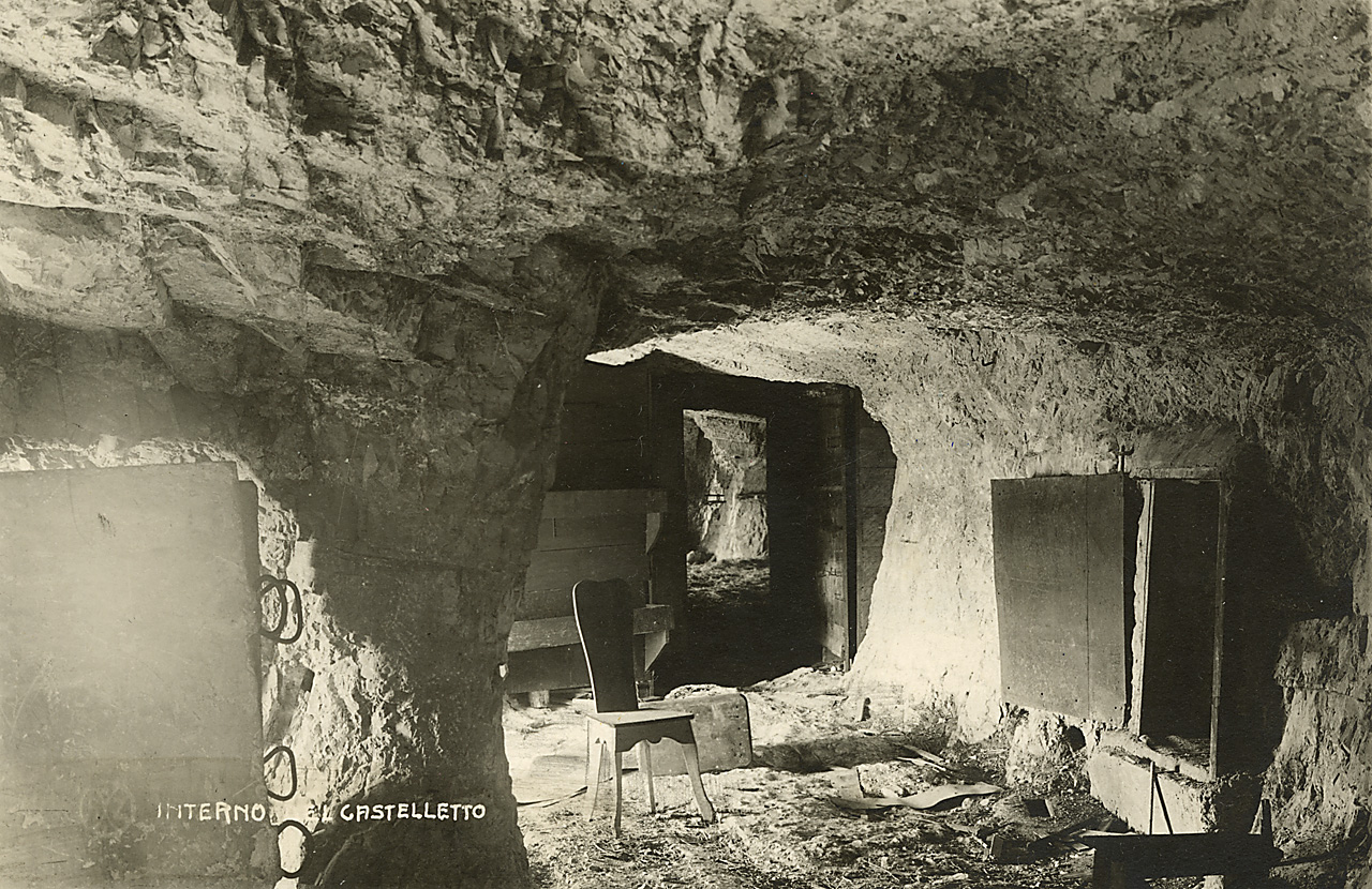 Grotte e gallerie militari, interno del castelletto – Veneto